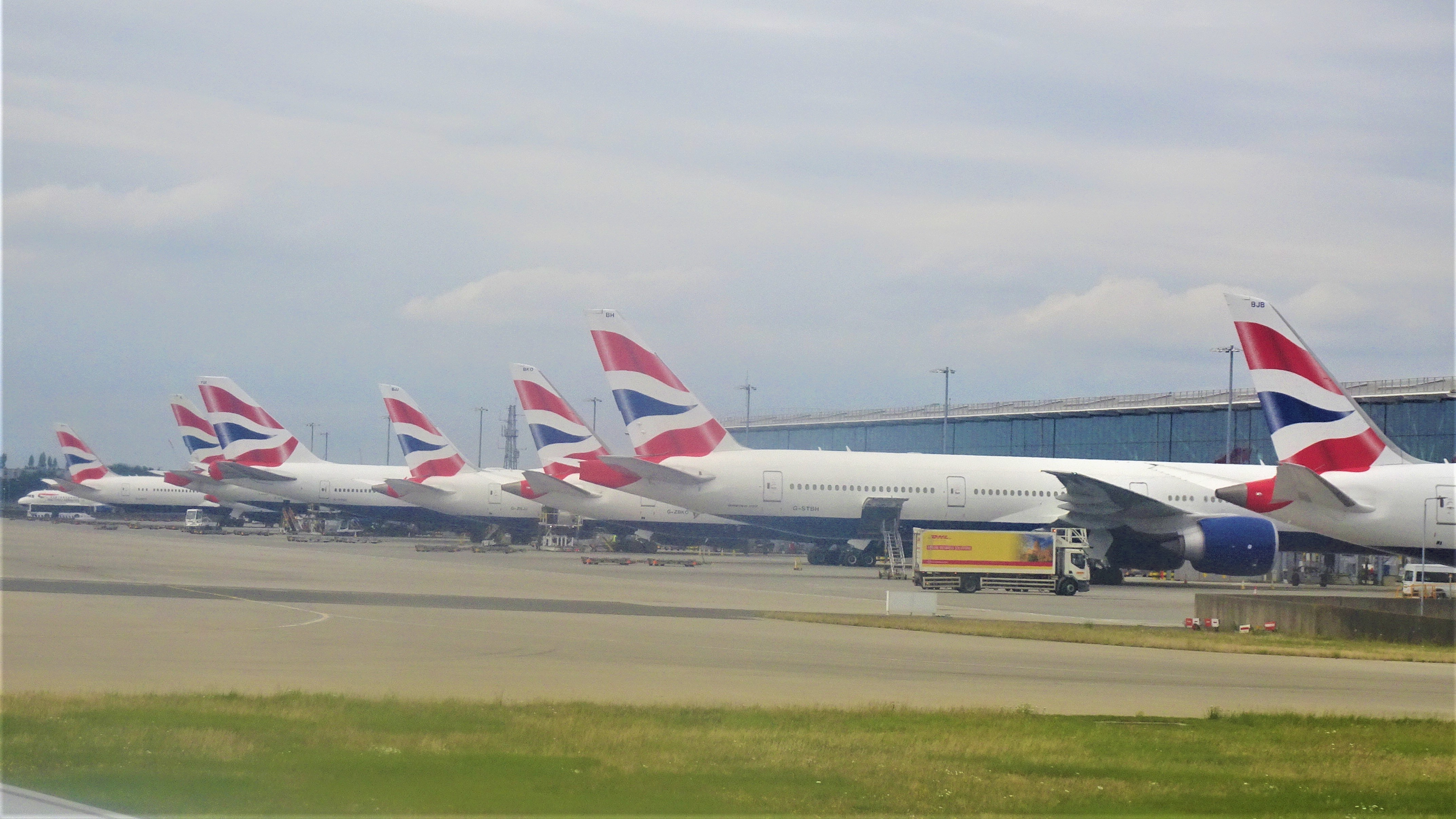 ロンドン・ヒースロー空港で別の旅客機の機内から撮影。